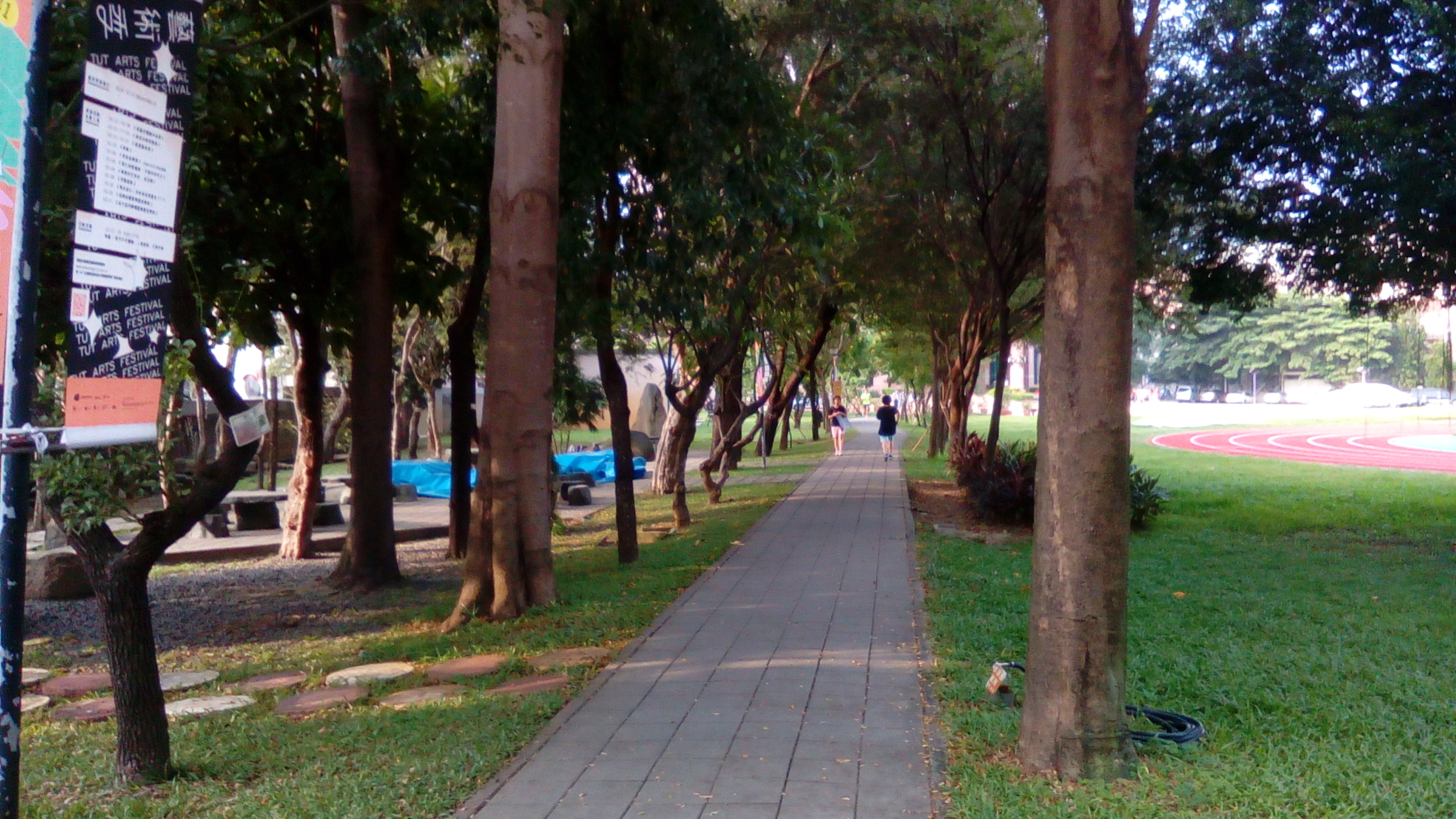 連結圖書館與後門的地磚路